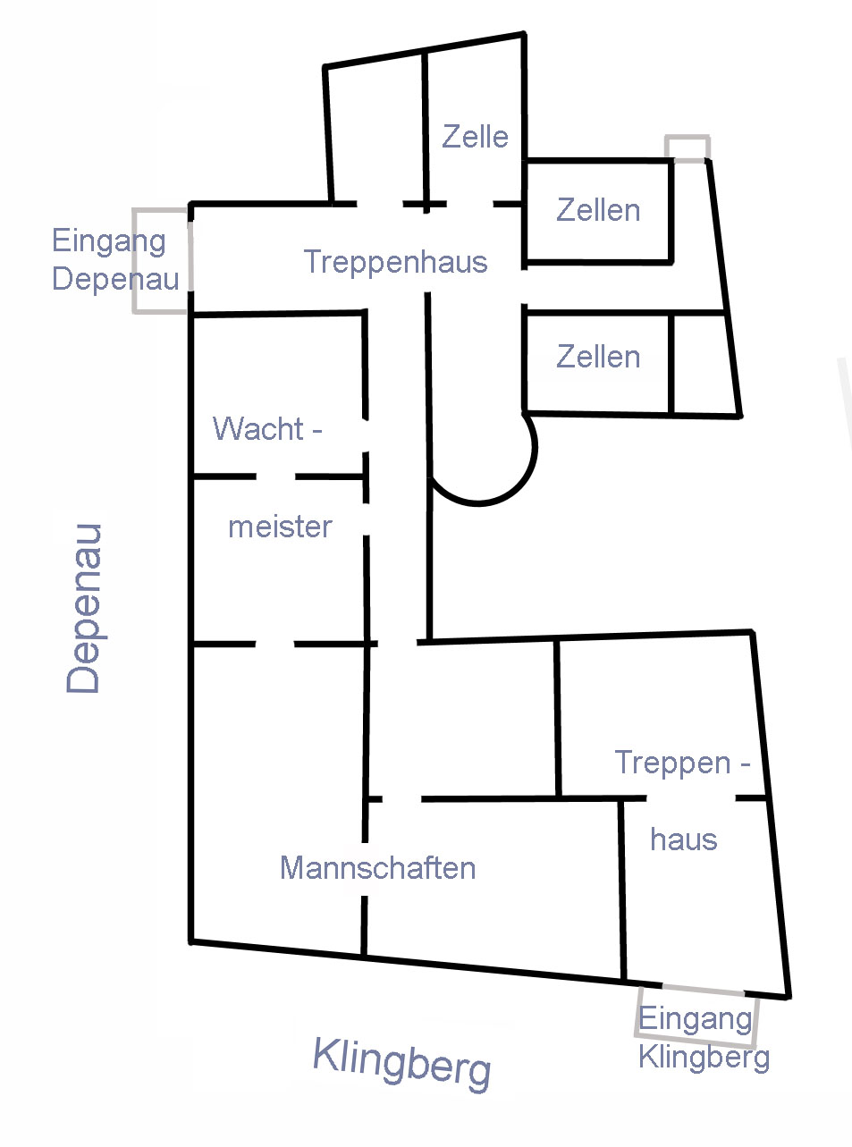 Hamburg, Grundrissskizze Haus der Landherrenschaften, ursprüngliche Nutzung This is a photograph of an architectural monument.